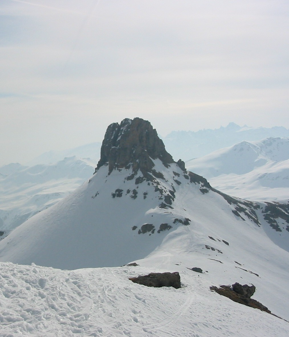 Spitzmeilen vom Wissmilen